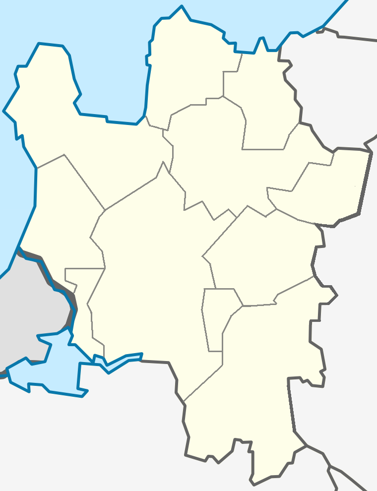 Кингисеппский район